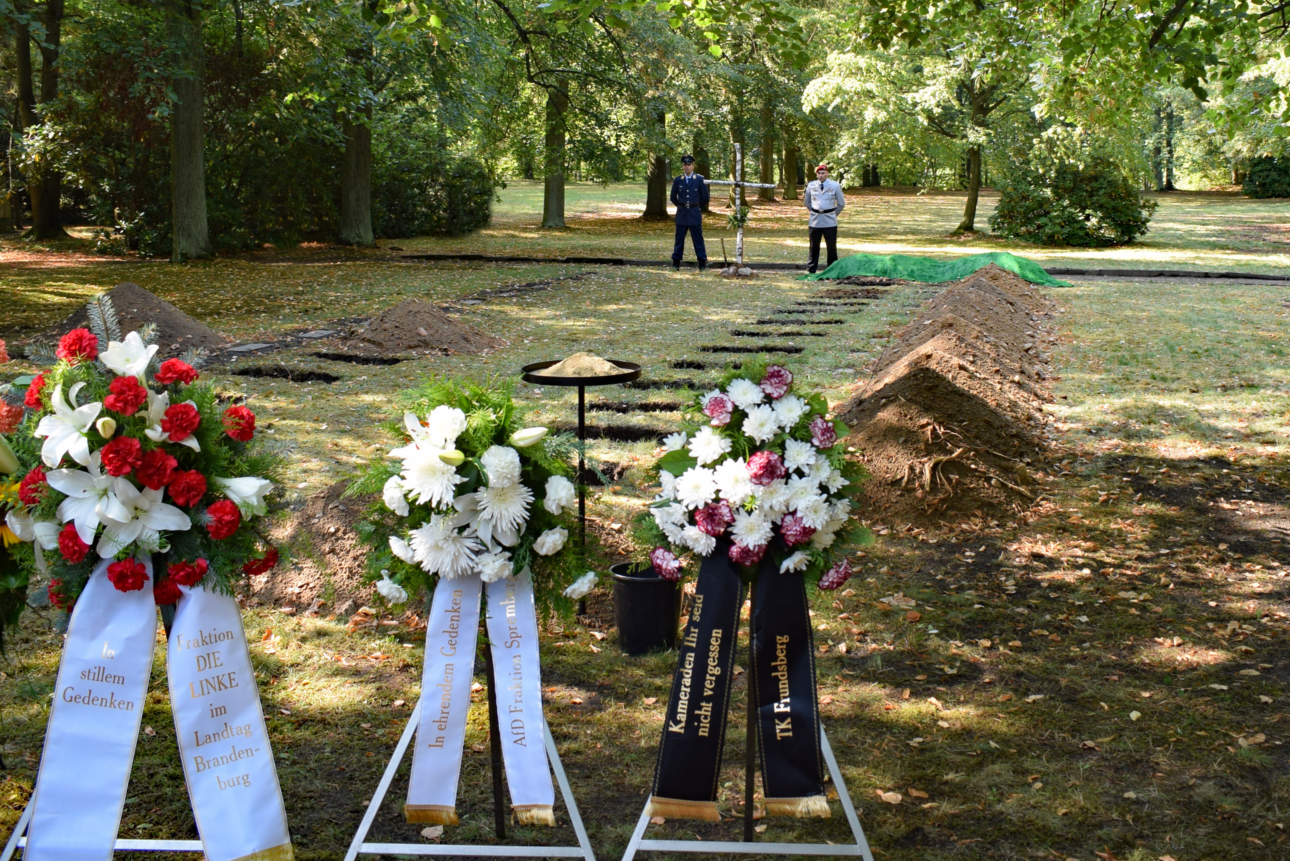 Einbettungsfeier auf dem Deutschen Soldatenfriedhof in Spremberg im August 2019